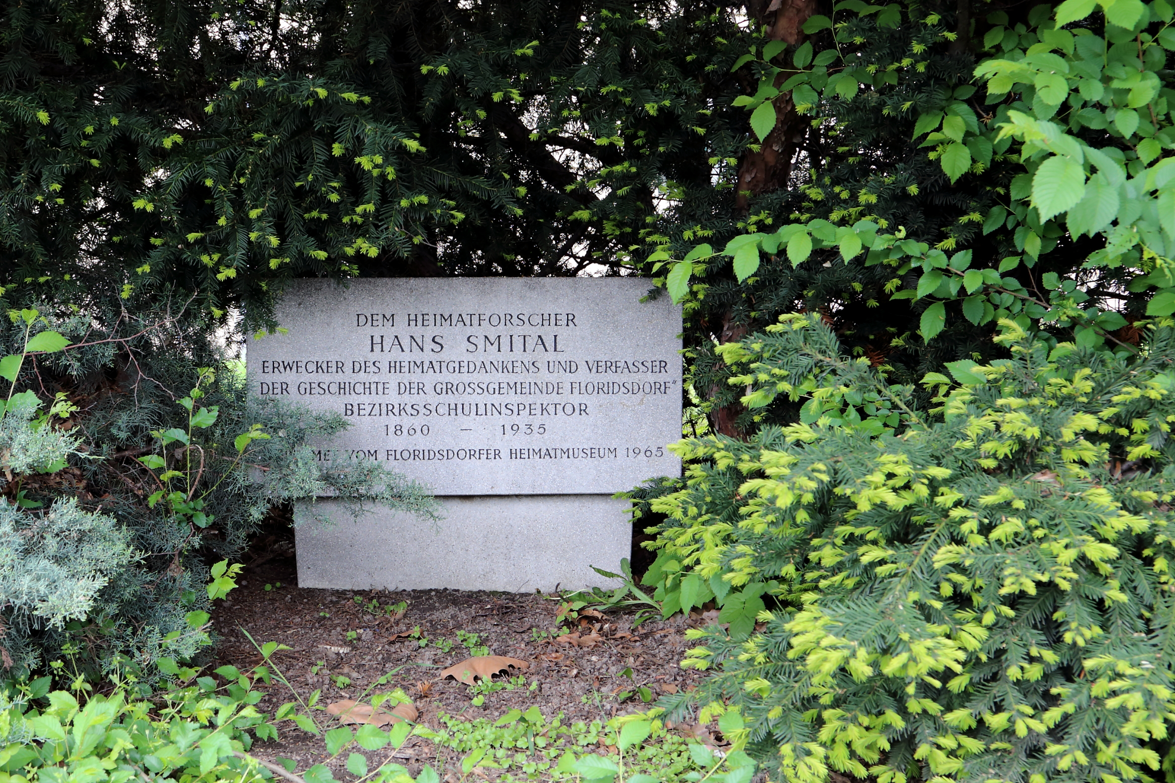 Hans-Smital-Gedenkstein beim Bezirksmuseum in Floridsdorf, ein Ortsteil der österreichischen Hauptstadt Wien. Hans Smital (1860–1935) war ein Heimatforscher (Verfasser der Geschichte der Großgemeinde Floridsdorf, 1903) und Lehrer. Ab 1888 war er Leiter der Floridsdorfer Bürgerschule und wurde um 1900 Direktor der von ihm initiierten Kaiser Franz Joseph- Jubiläumsschule in der Deublergasse.